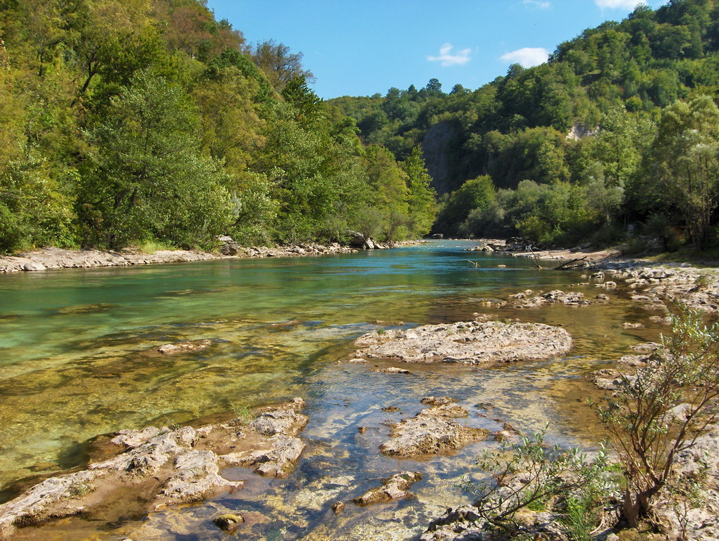 Motif de la Neretva, l'endroit dit Bukovica